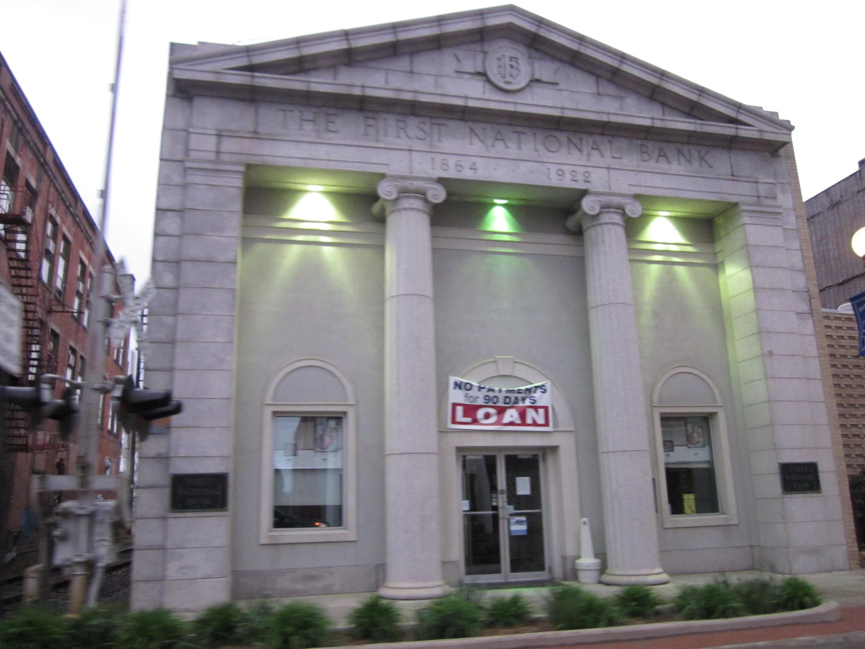 Greenville, Pennsylvania